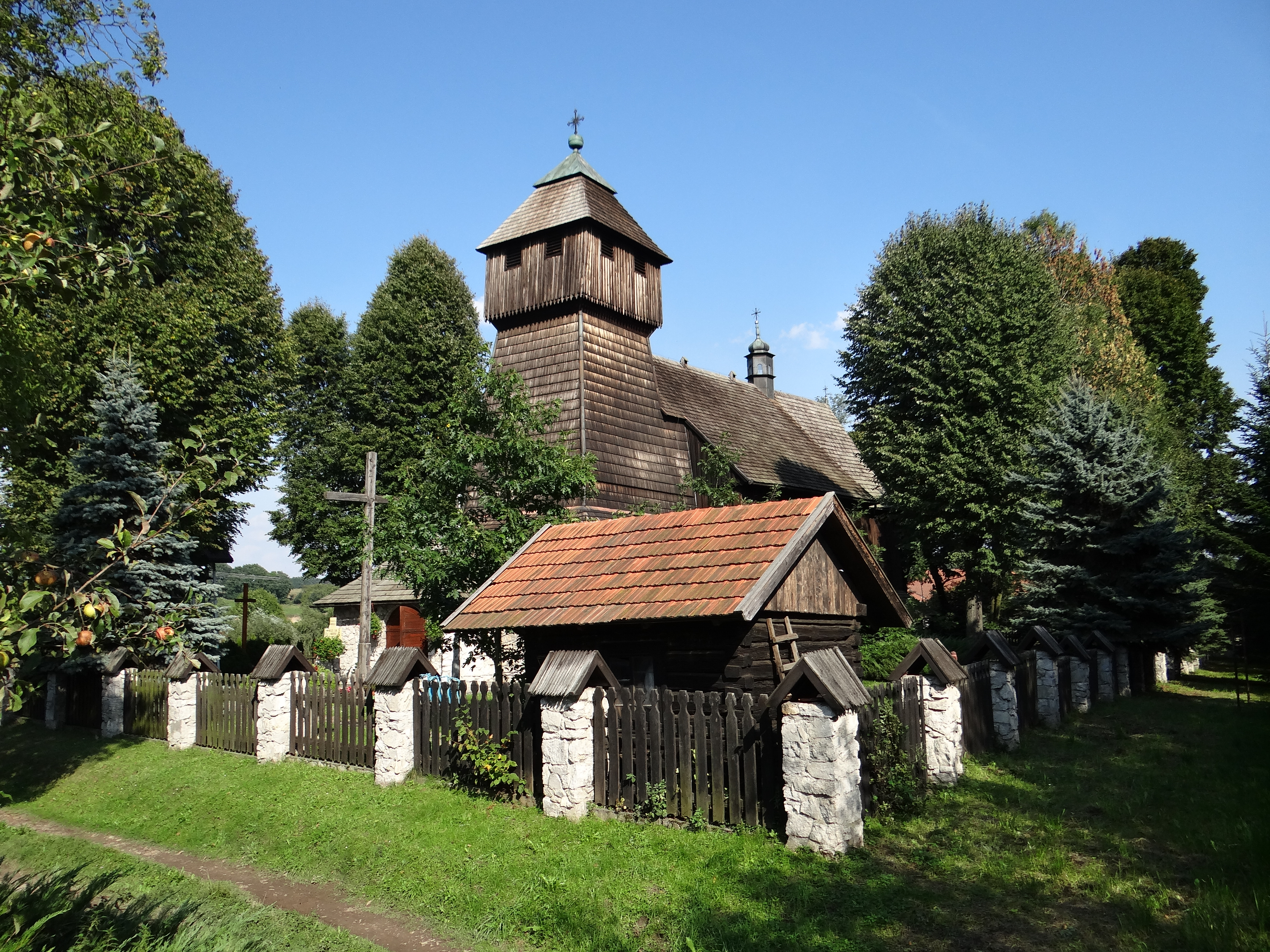 Nowosielce, kościół par. p.w. św. Marii Magdaleny, 1595, XIX, XX